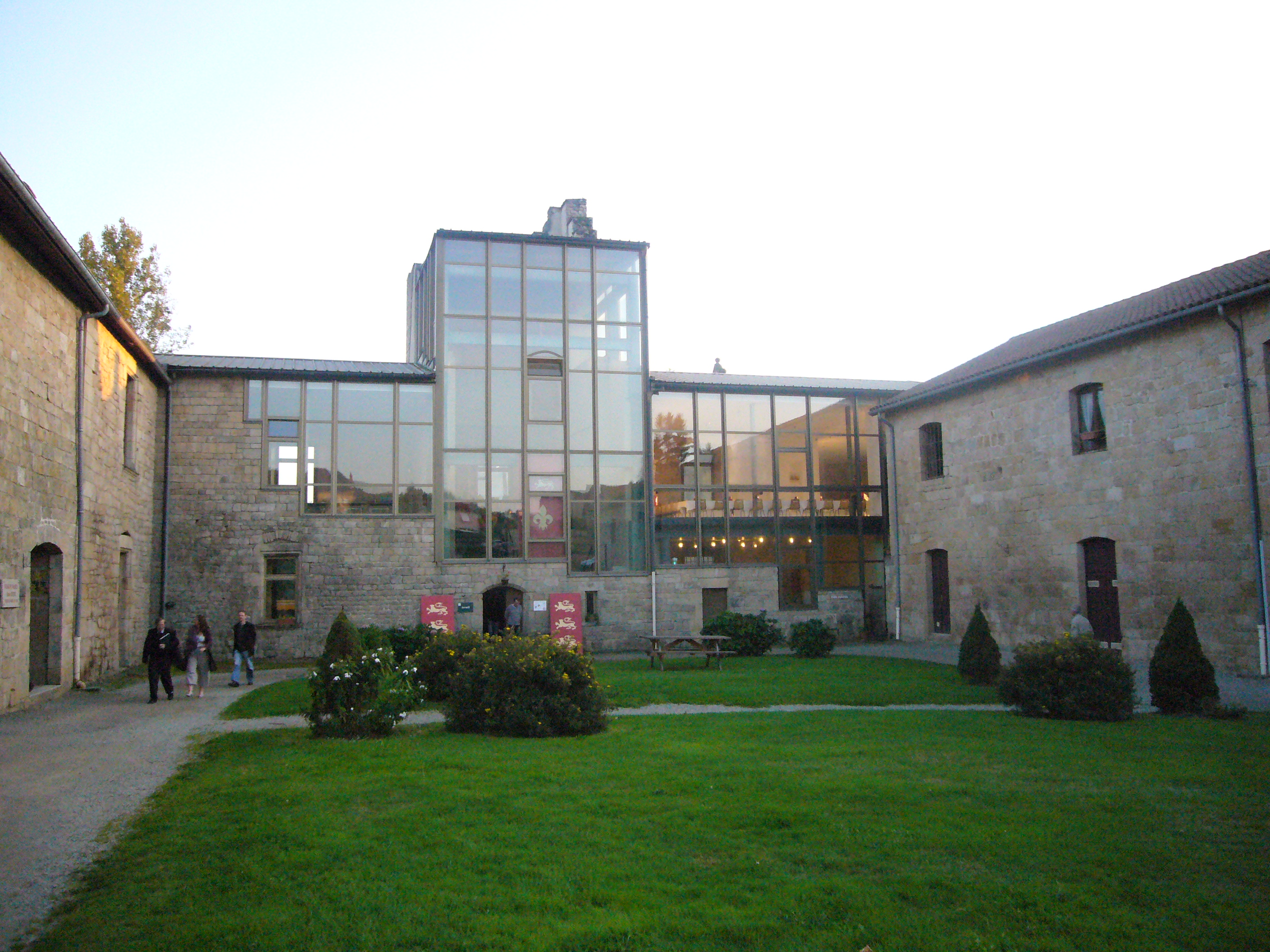 L'ancien château de Nedde (Haute-Vienne, France), réaménagé (Village de vacances)